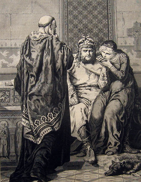 Détail, Illustration de 1875 publiée dans le Monde - Morvan, Souverain de Bretagne